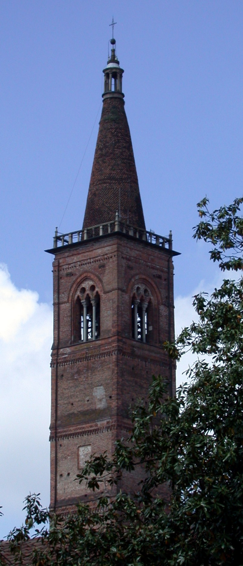 Il Campanile della Chiesa di Santa Maria del Carmine